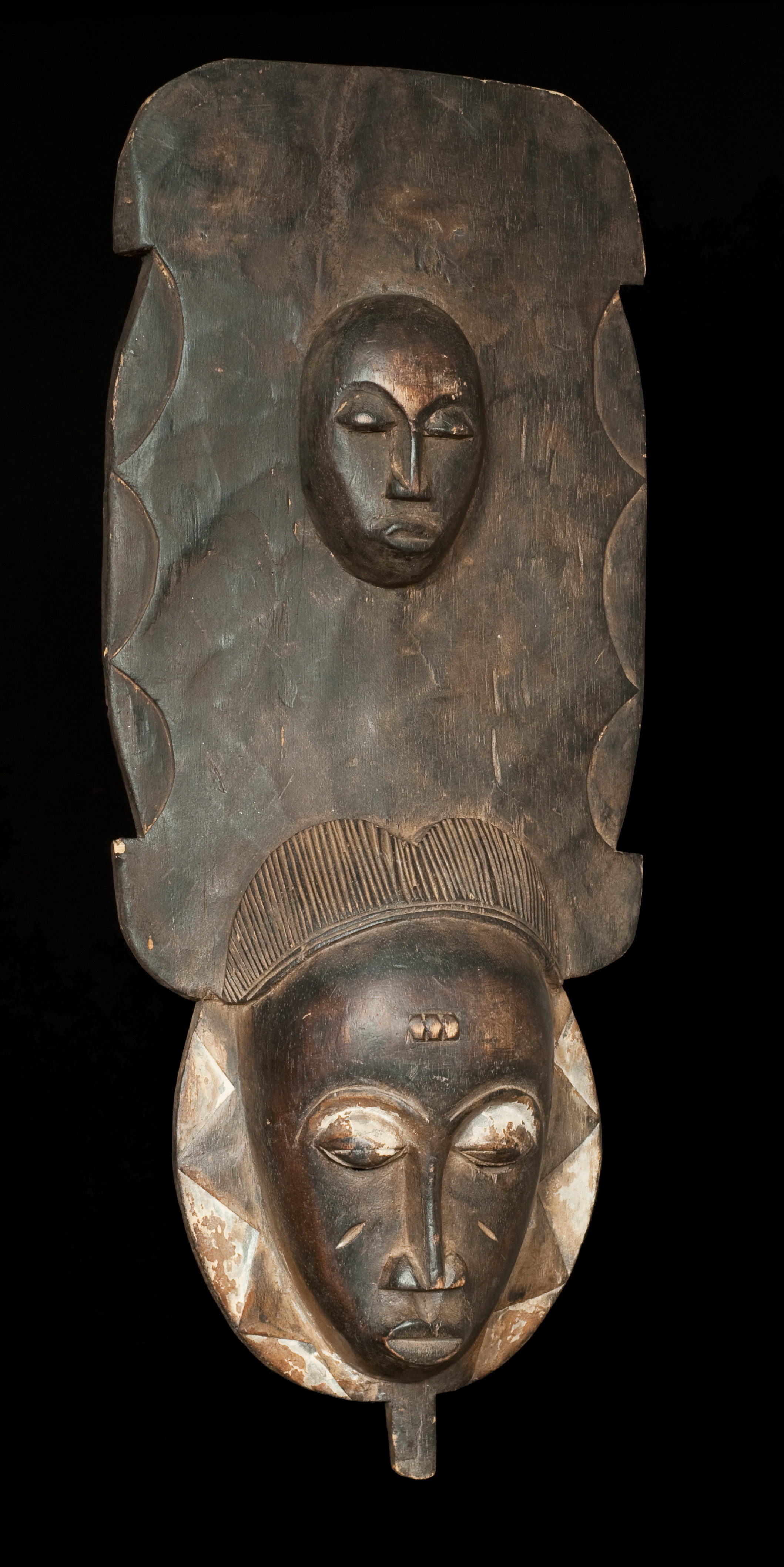 Masque africain à deux visages